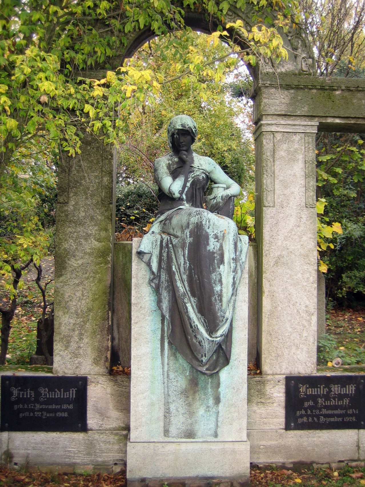 St.-Marien- und St.-Nikolai-Friedhof 1, Berlin, Erbbegräbnis Wolff. Skulptur von Hans Dammann.